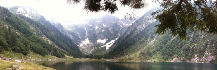 Val Cama, Graubunden, Switzerland